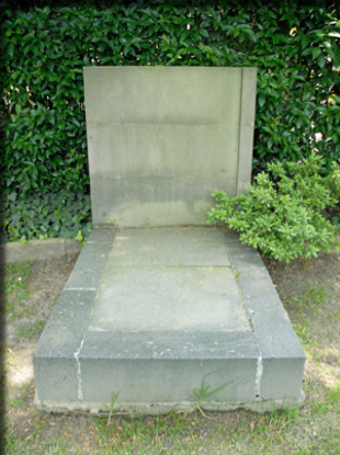 Sepulcro de Calixto Bravo en la Rotonda de las Personas Ilustres de la Ciudad de México.